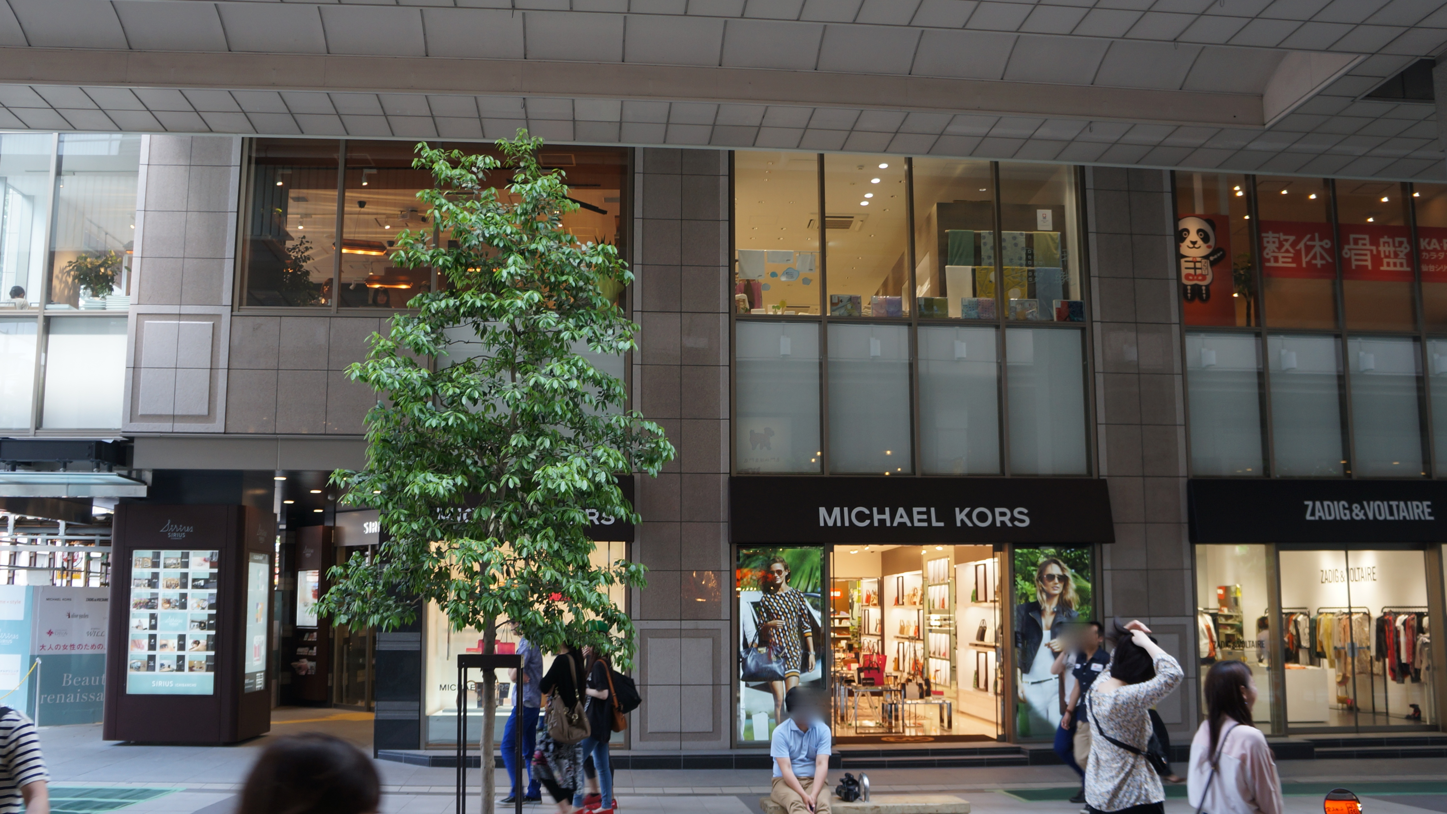 シリウス・一番町